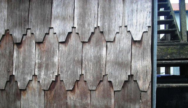 Pared revestida de tejuelas de alerce (Fitzroya cupressoides) con despunte escalonado. Dalcahue, Chiloé, Chile